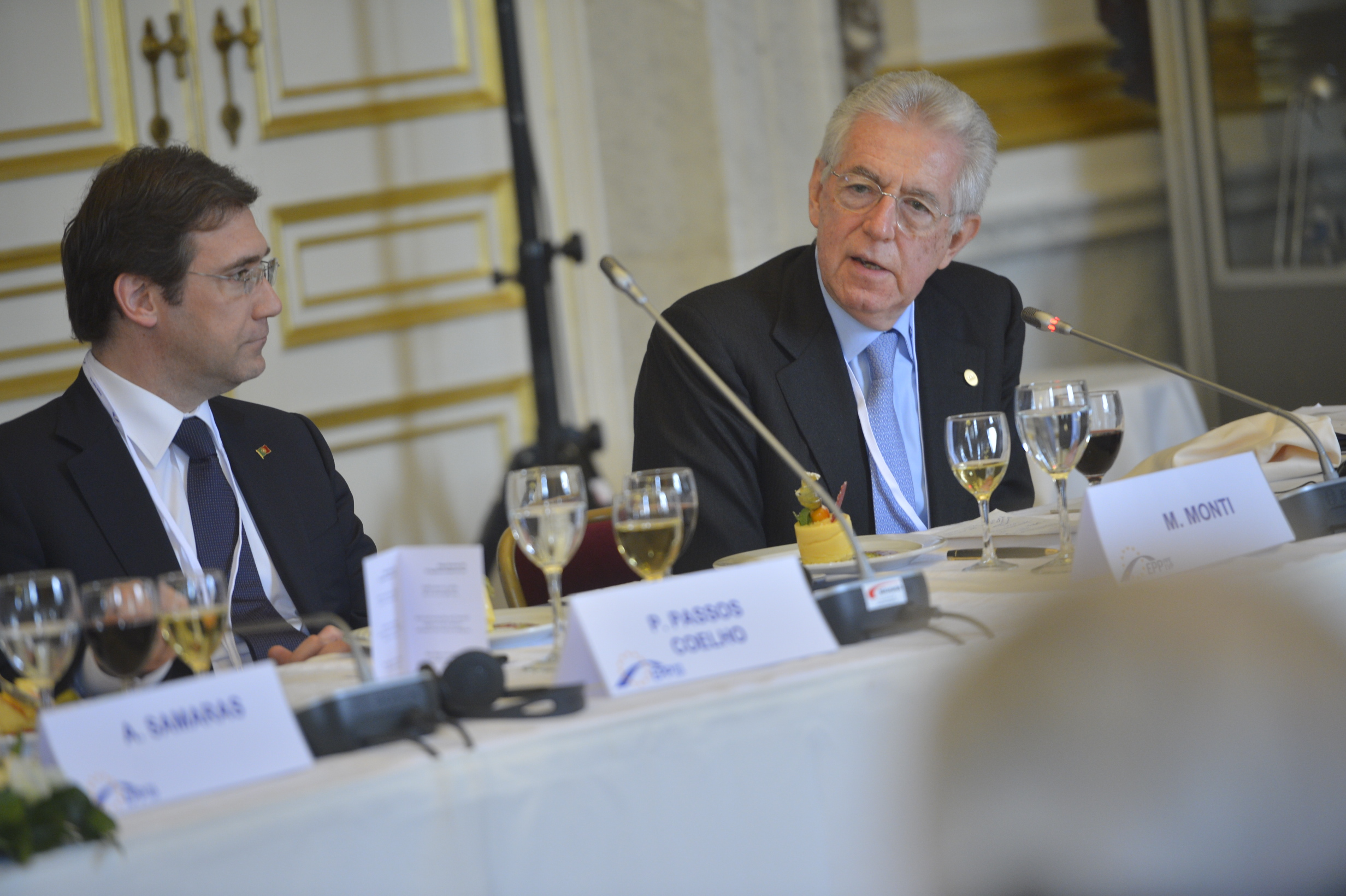 EPP Summit, 14 Mar. 2013